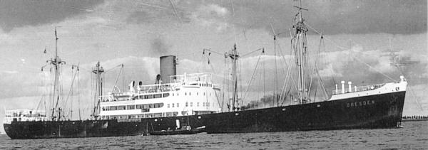 Das Kombischiff DRESDEN (3) des NDL für den Dienst zur Westküste Südamerikas